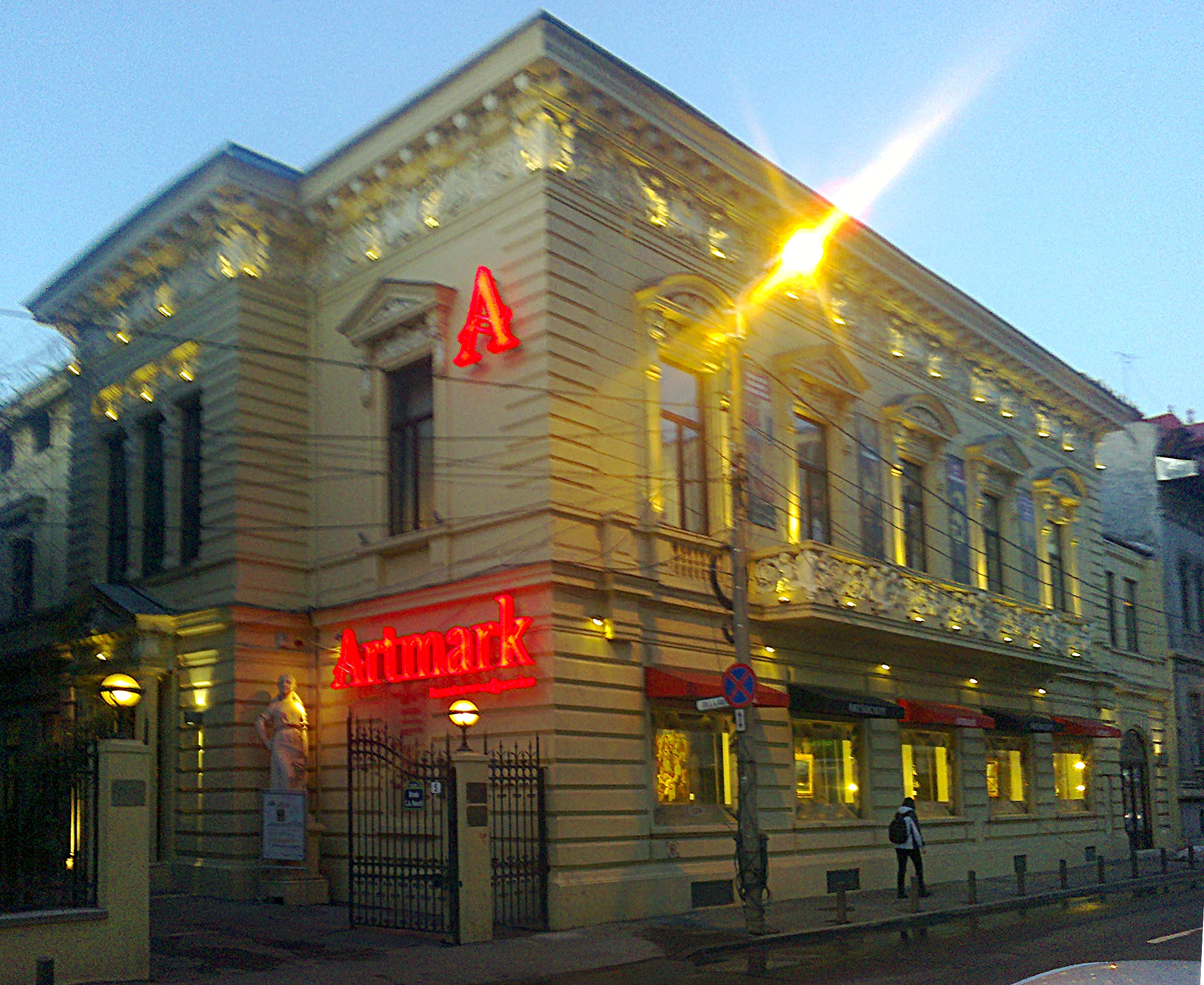 Palatul Cesianu-Racovita, Bucuresti version 2.jpg